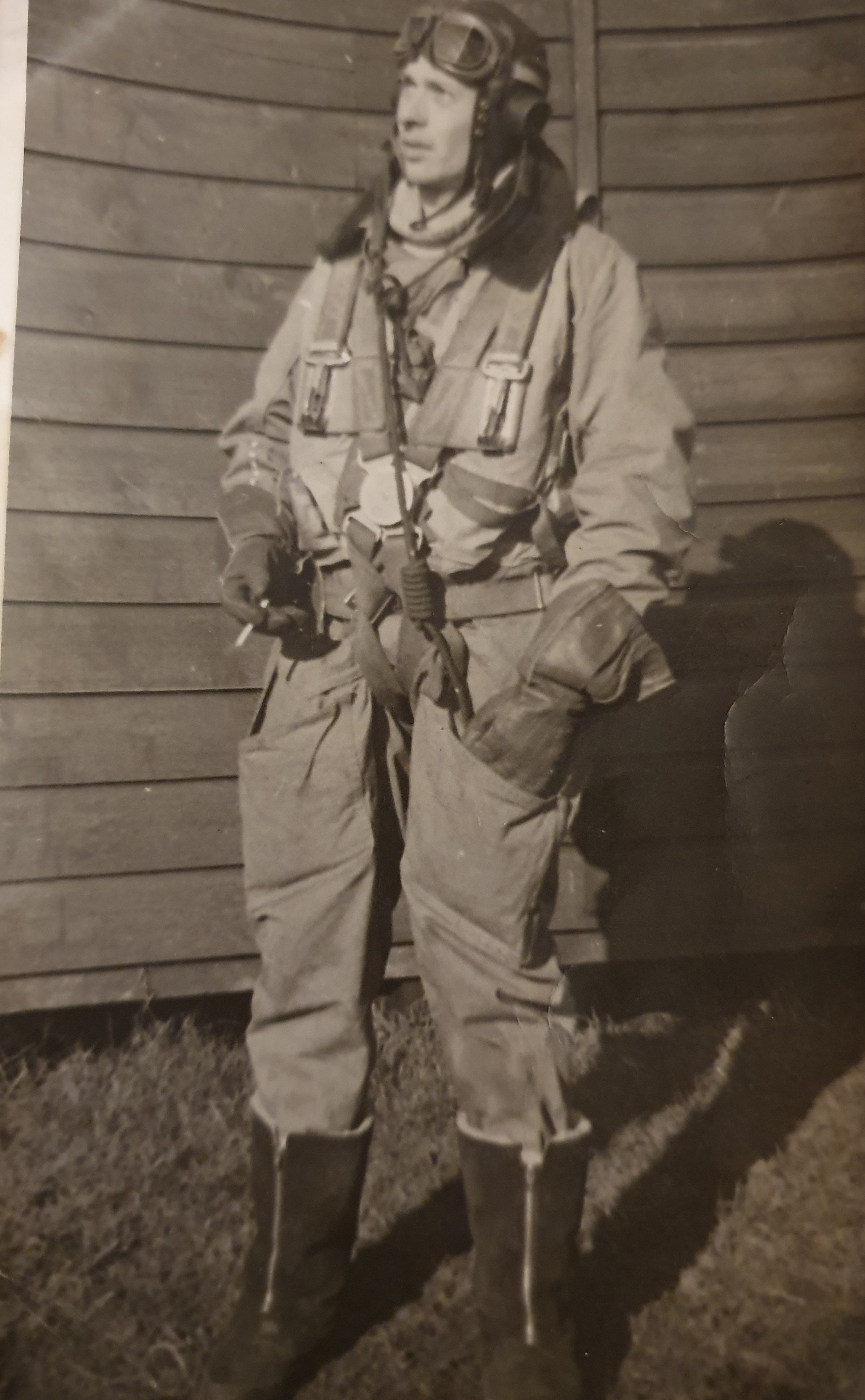 Adolf Frantzen i NRAF uniform under tjenestegjøring på Island